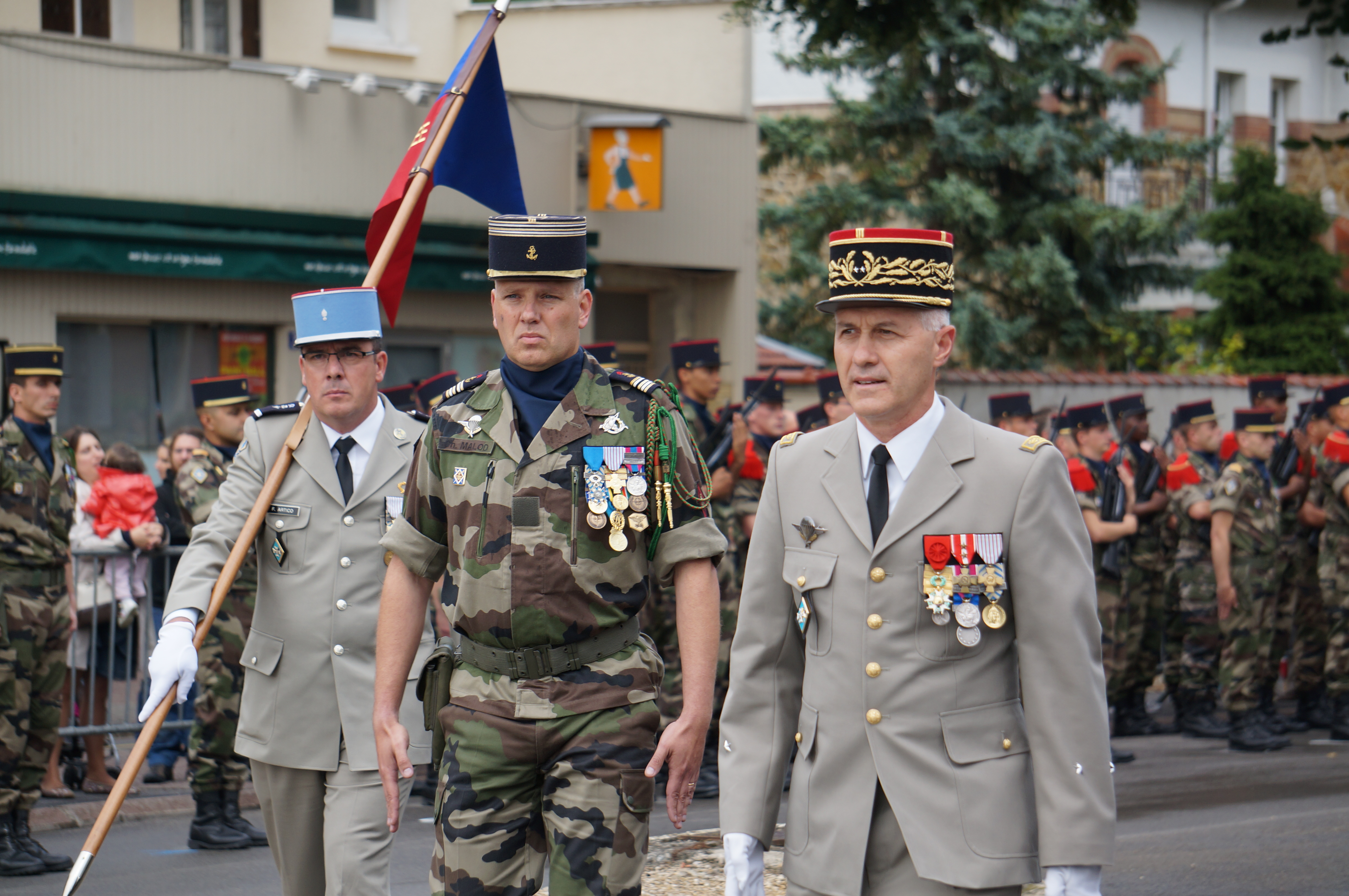 la tête de la 1er_brigade_mécanisé, général Guibert, son porte fanion, le lt-colonel Malod.